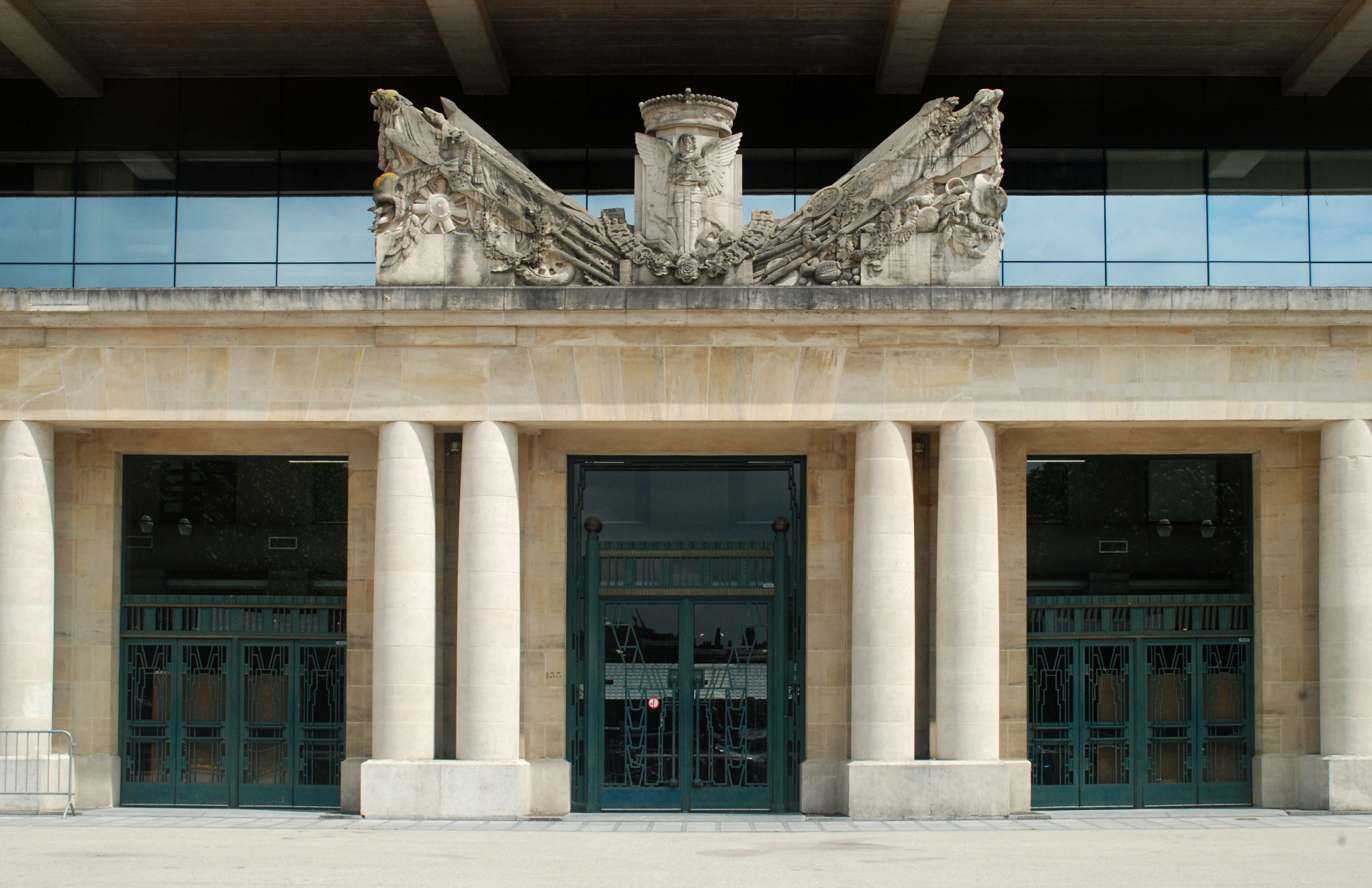 Belgique - Bruxelles - Stade du Centenaire (Architecture monumentale - architecte Joseph Van Neck - 1929-1930)